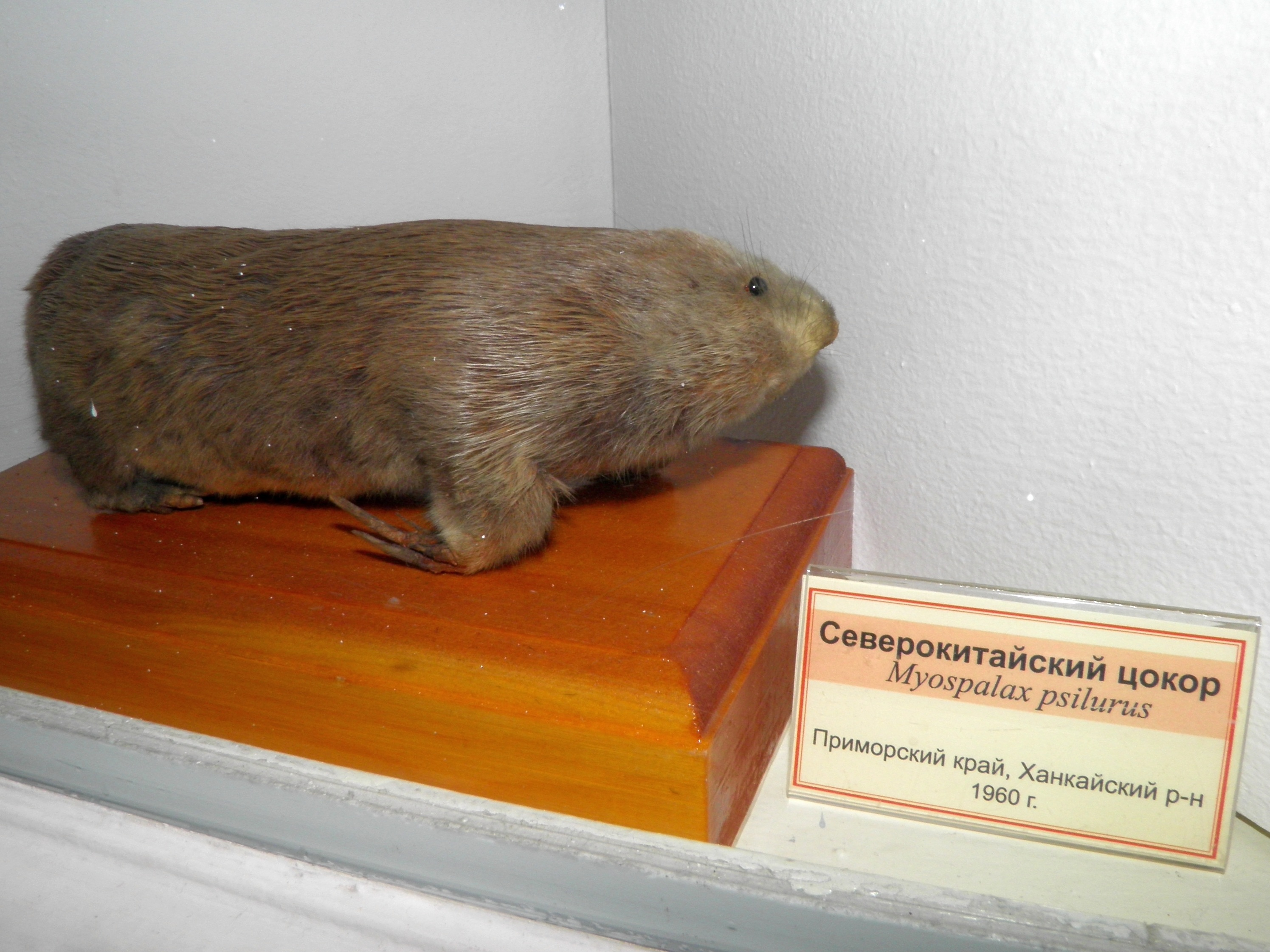 Забайкальский цокор или Северокитайский цокор (Myospalax psilurus)